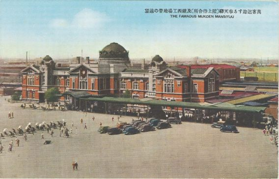 中文（中国大陆）: 奉天站停车场